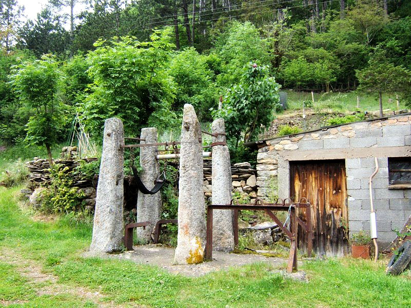 ferradou en Lozère